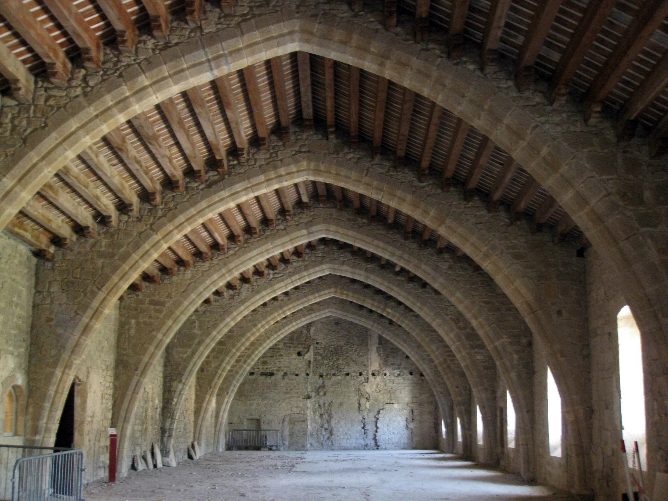 Antiga abadia Sainte-Marie d'Orbieu (La Grassa)